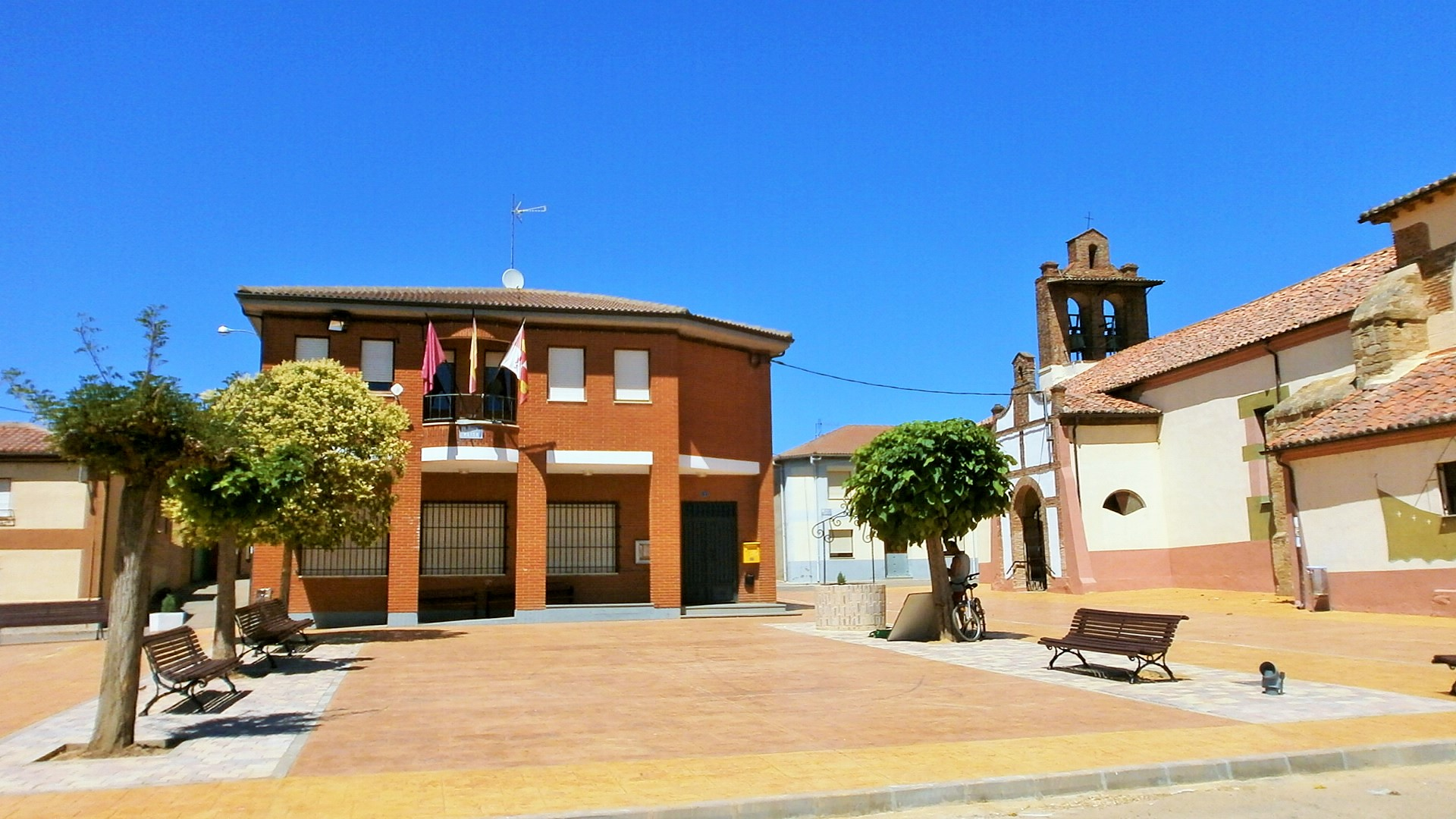 Valdemora